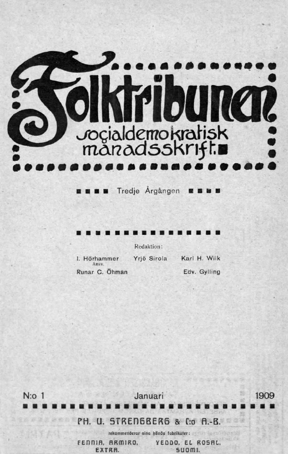 Folktribunen-lehden no 1 kansisivu tammikuu 1909